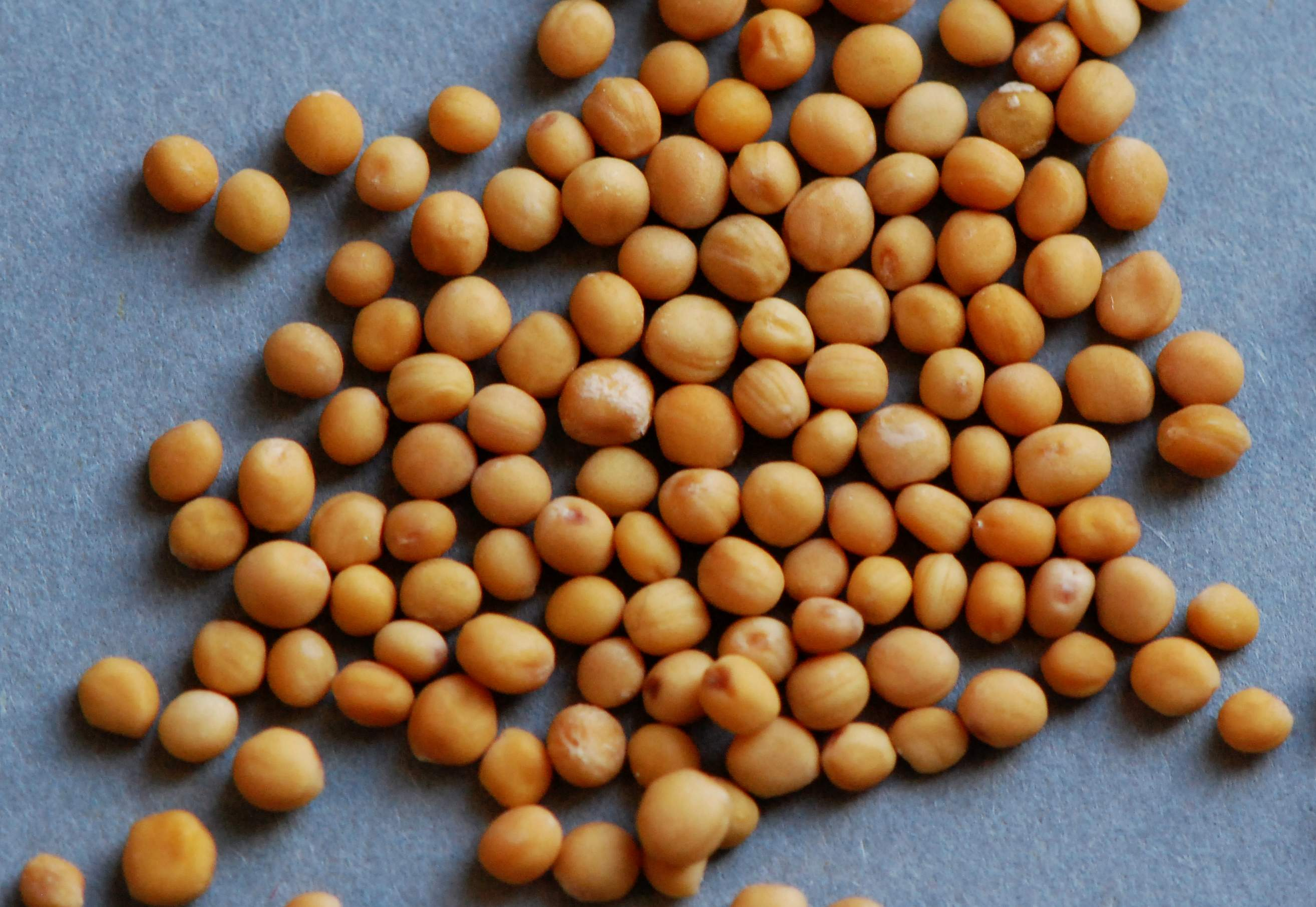 Sinapis alba, moutarde blanche, graines